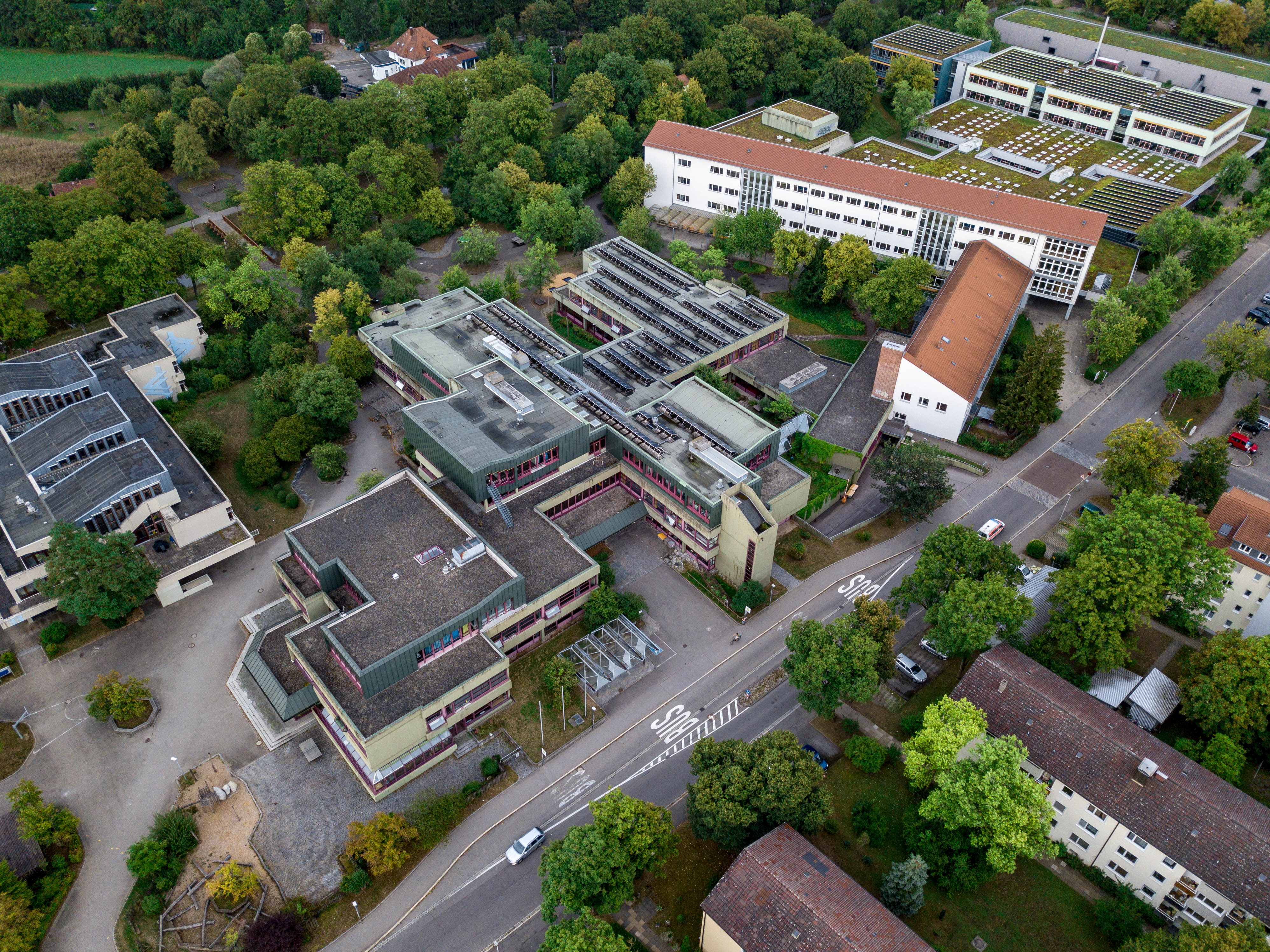 Tübingen. Carlo-Schmid-Gymnasium aus der Luft.